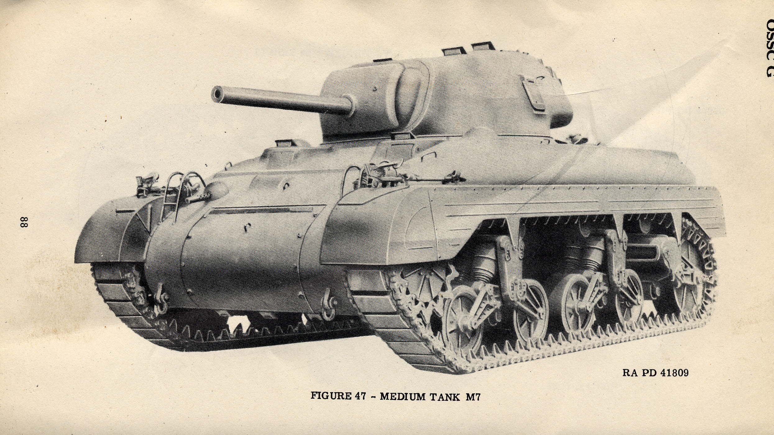 M7 Medium Tank